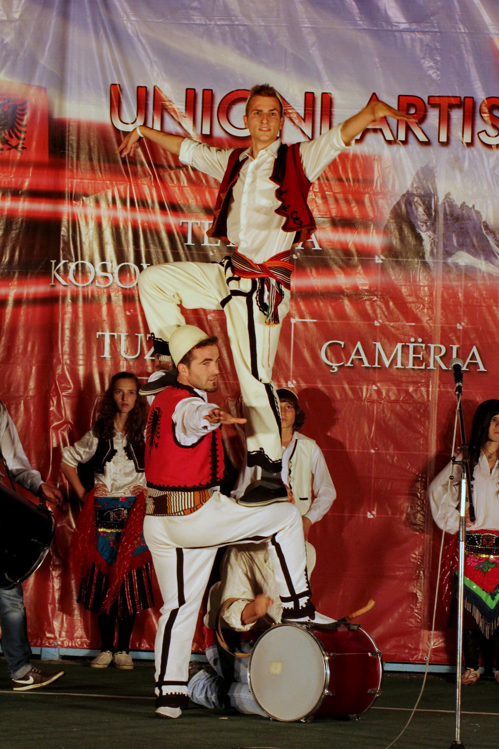 Sofra Dardane - Bajram Curr 04